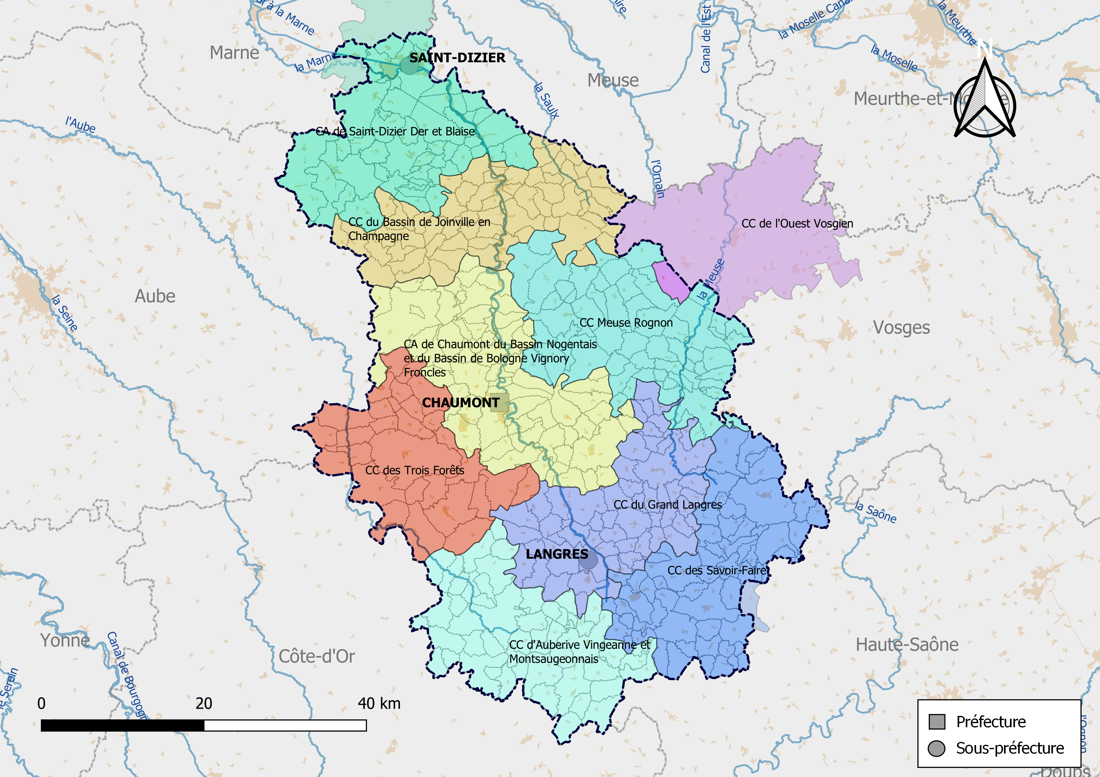 Carte des intercommunalités du département de la Haute-Marne, France. Composition au 1er janvier 2019.